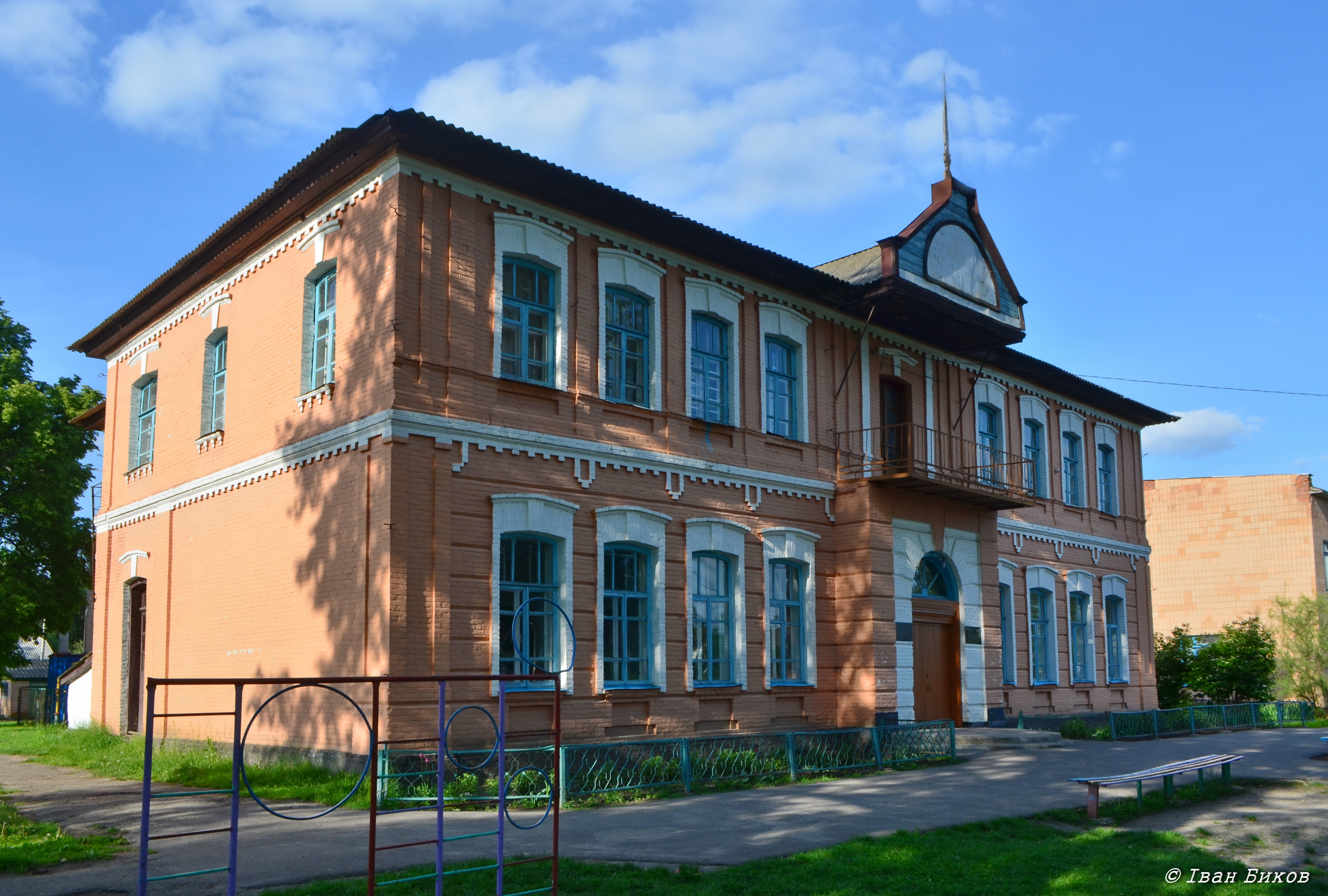 Міністерська школа у волосному центрі Чорнухи будувалася у 1900-03 роках Лохвицьким земством.3 вересня 1903 року двокласна Чорнухинська міністерська школа з п’ятирічним терміном навчання була відкрита. Хоч у 1972 році поряд з збудували новий корпус, в стінах старої школи і досі вчаться учні...Архітектура школи досить цікава - статична, монументальна цегляна будівля в стилі історизм з елементами класицизму, симетрична. Вісь головного входу підкреслена ризалітом з балконом та цікавим дерев'яним фронтончиком. Декор представлений пілястрами, рустами, карнизами та лиштвами. Будівля Чорнухинської міністерської школи має бути внесена у реєстр пам'яток архітектури ( можливо - і історії) України.